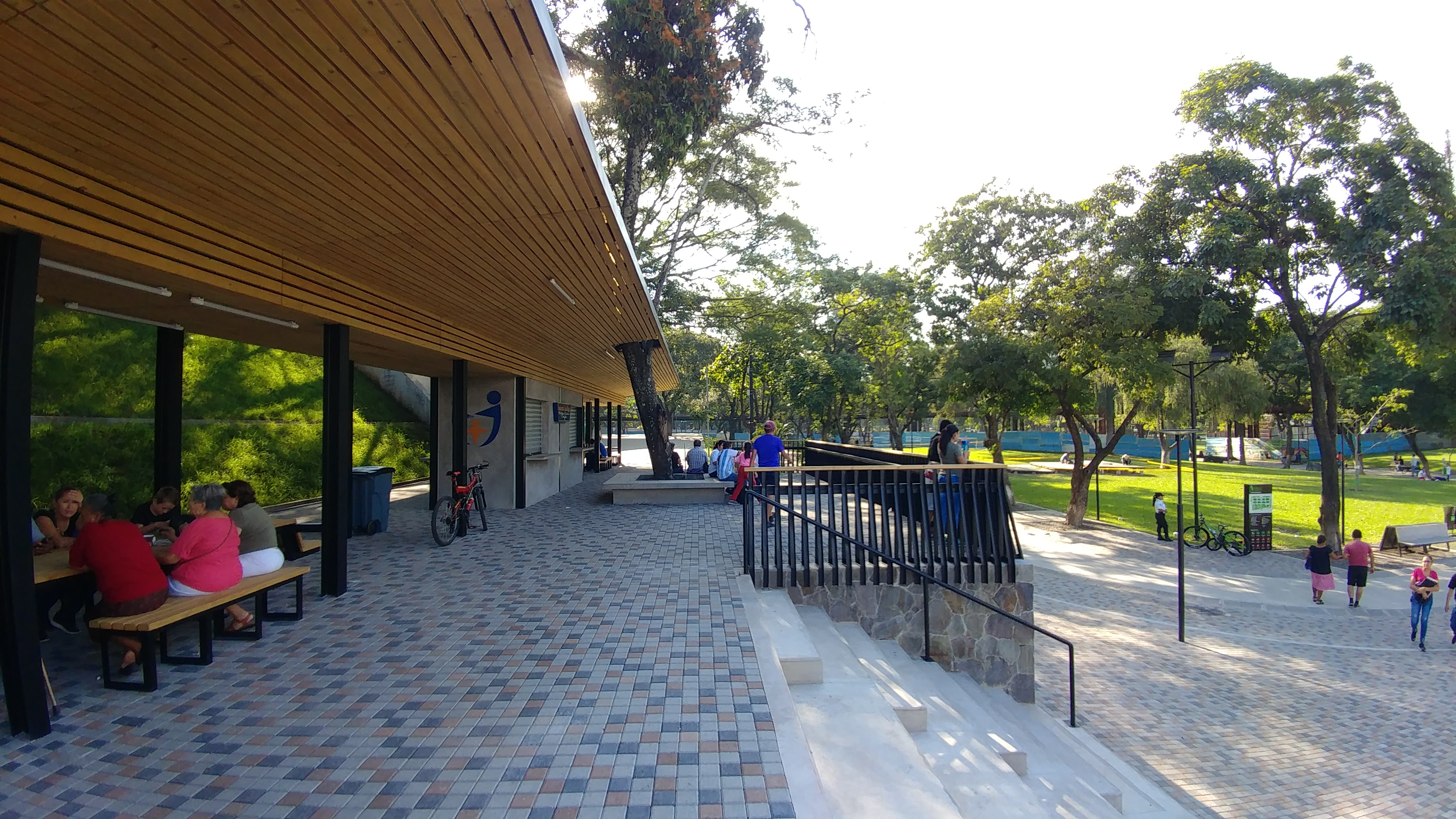 Mesas para pic nic parque cuscatlán